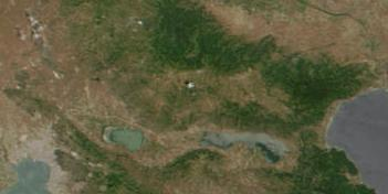 Богданската планина, Лъгадинското и Бешичкото езеро между заливите Солунски (вляво) и Орфано (вдясно).